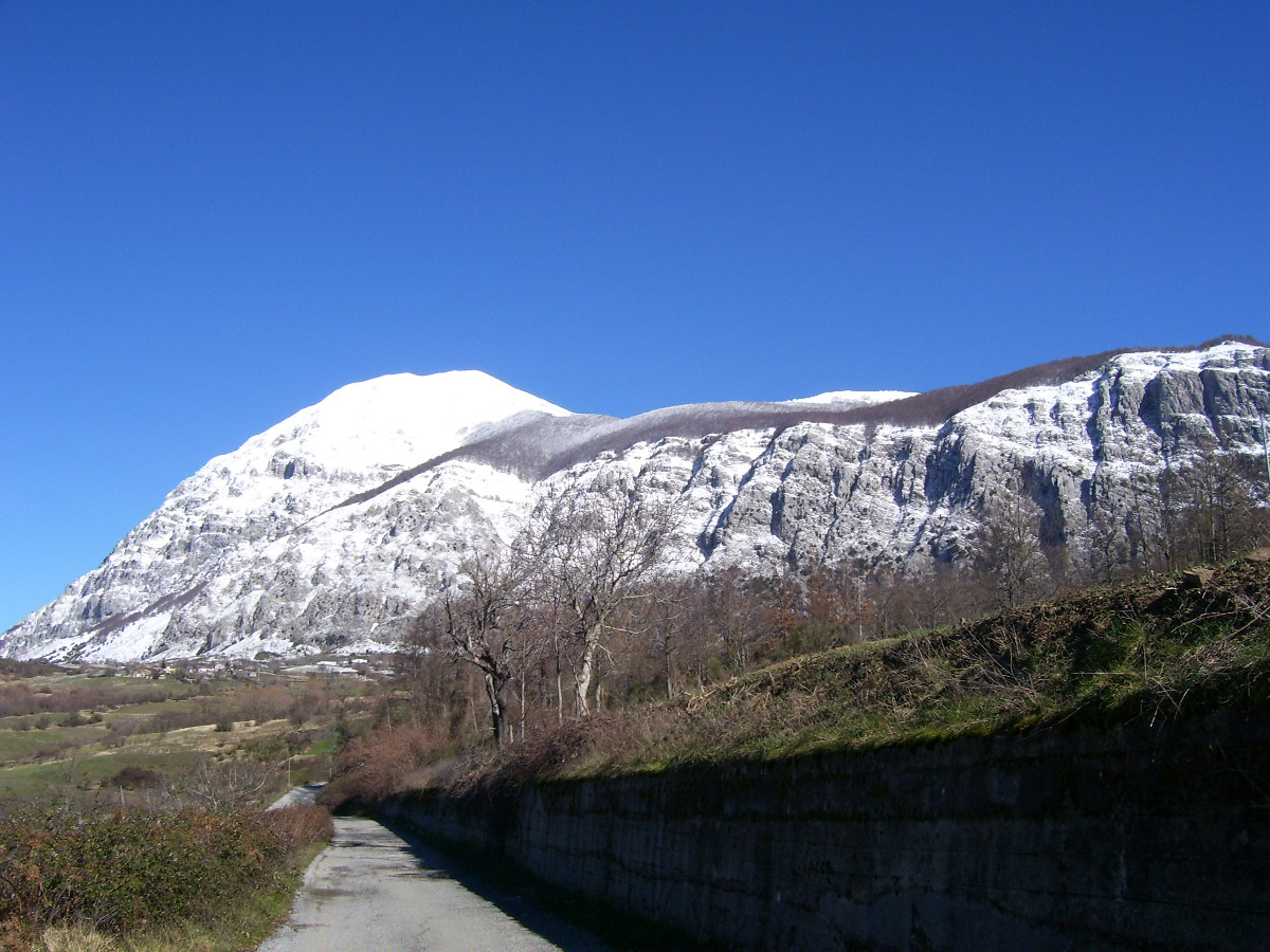 foto di AndreaCris Latronico, Monte Alpi gen/2007